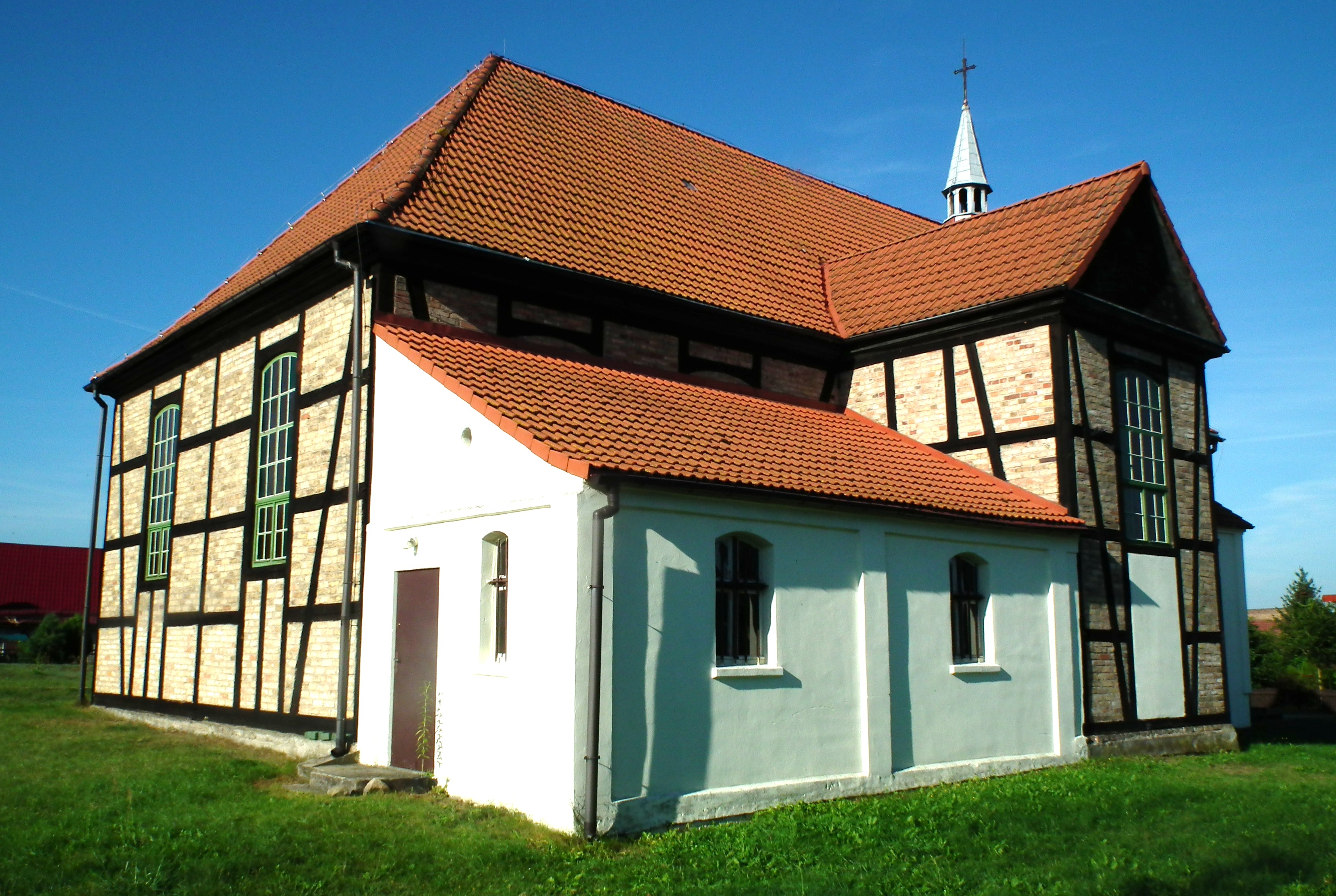 Kołczyn - dawny kościół ewangelicki, obecnie rzymskokatolicki parafialny p.w. św. Stanisława Kostki, XVIII